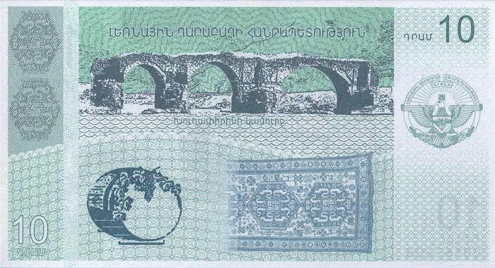 10 Dram